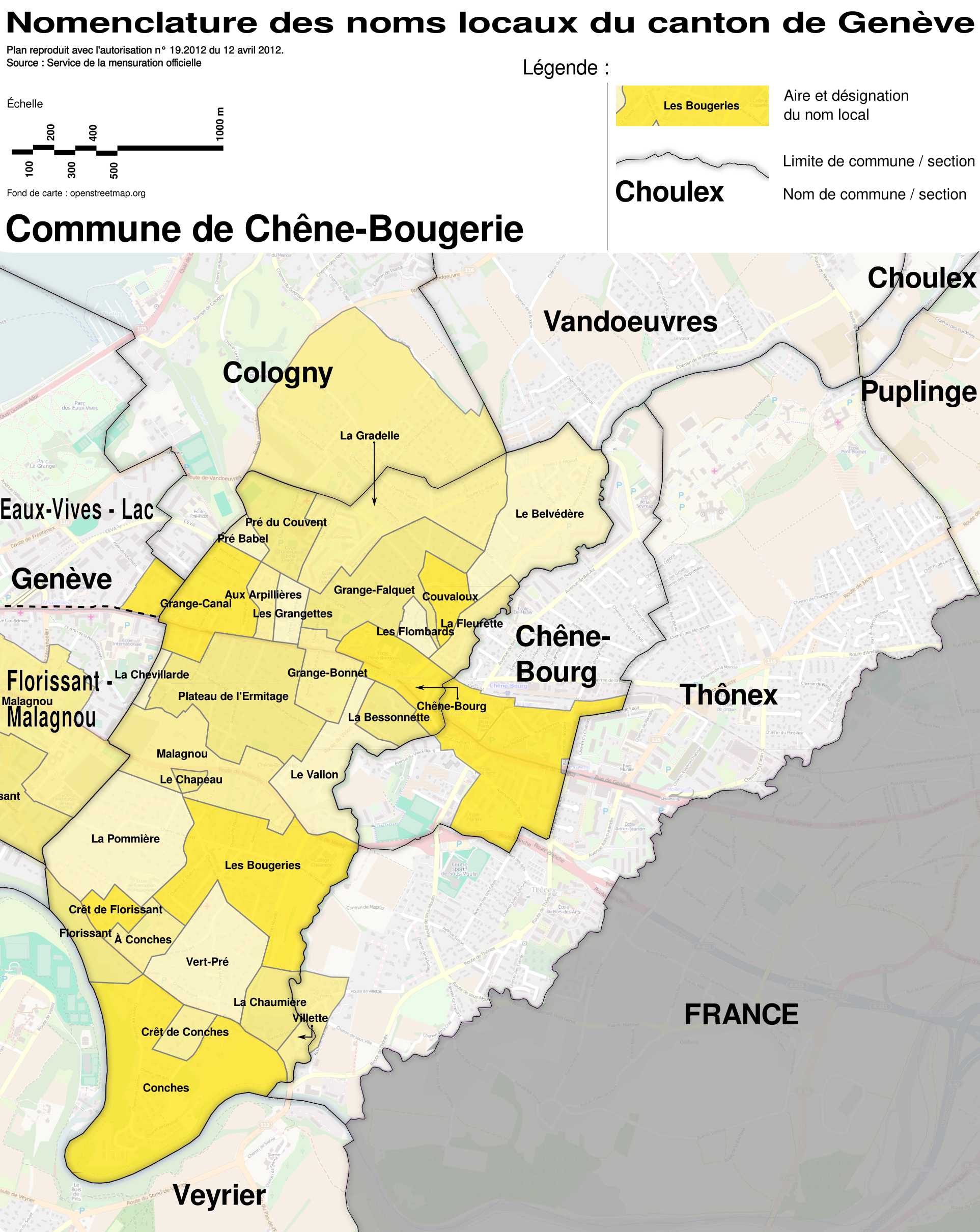 Nomenclature des noms locaux du canton de Genève, généralement appelés "Lieux-dit". Cette nomenclature a été recueillie entre 1932 et 1953 lors de la création du Plan d'Ensemble (PE) du canton de Genève. Plan reproduit avec l'autorisation n° 19.2012 du 12 avril 2012. Source : Service de la mensuration officielle. Noms locaux sur la commune de Chêne-Bougerie.